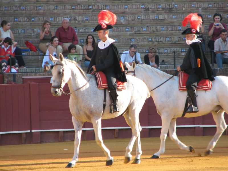 Corrida en la Maestranza sevillana